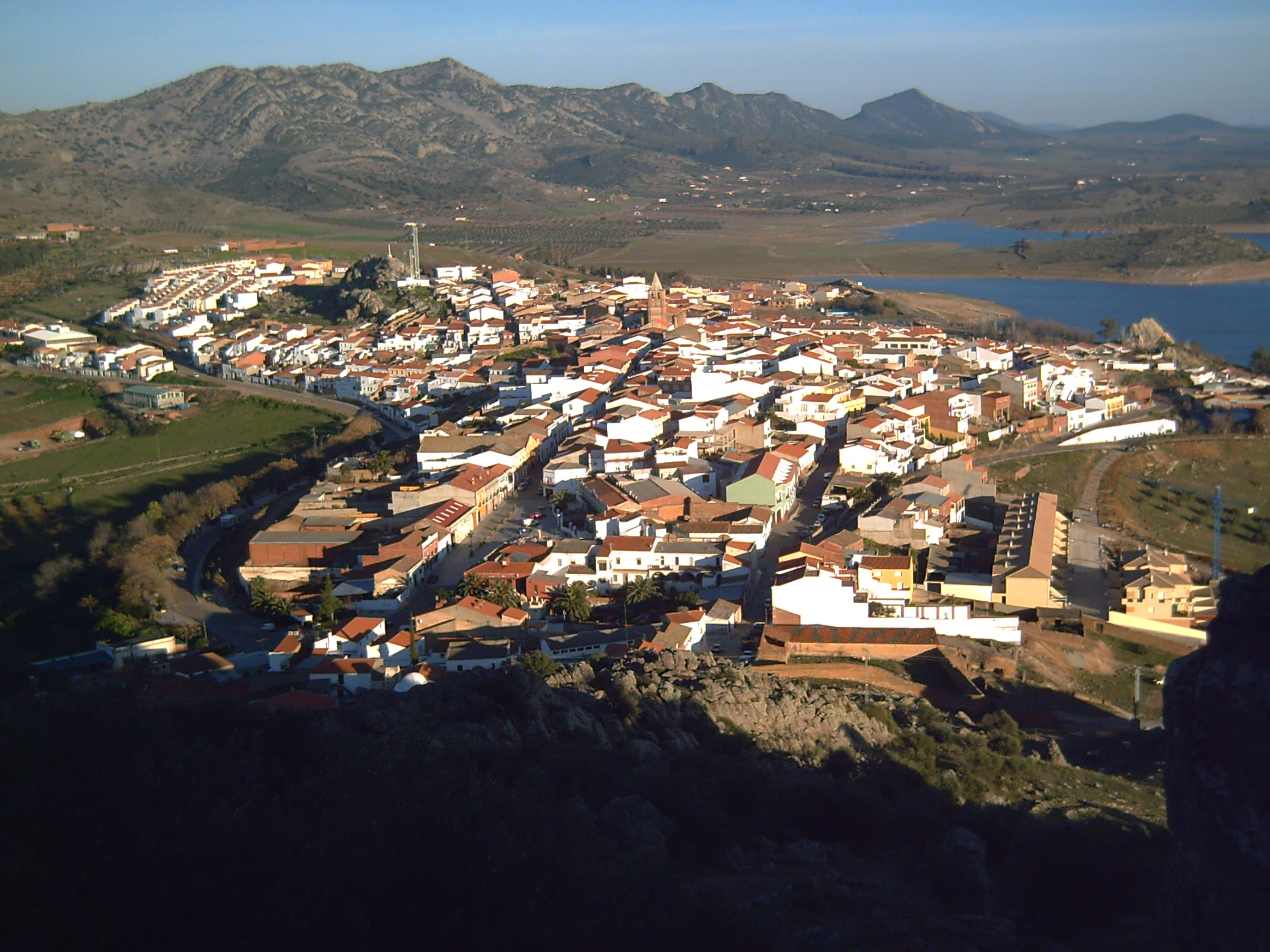 Alanhi endi el lombu el castillu